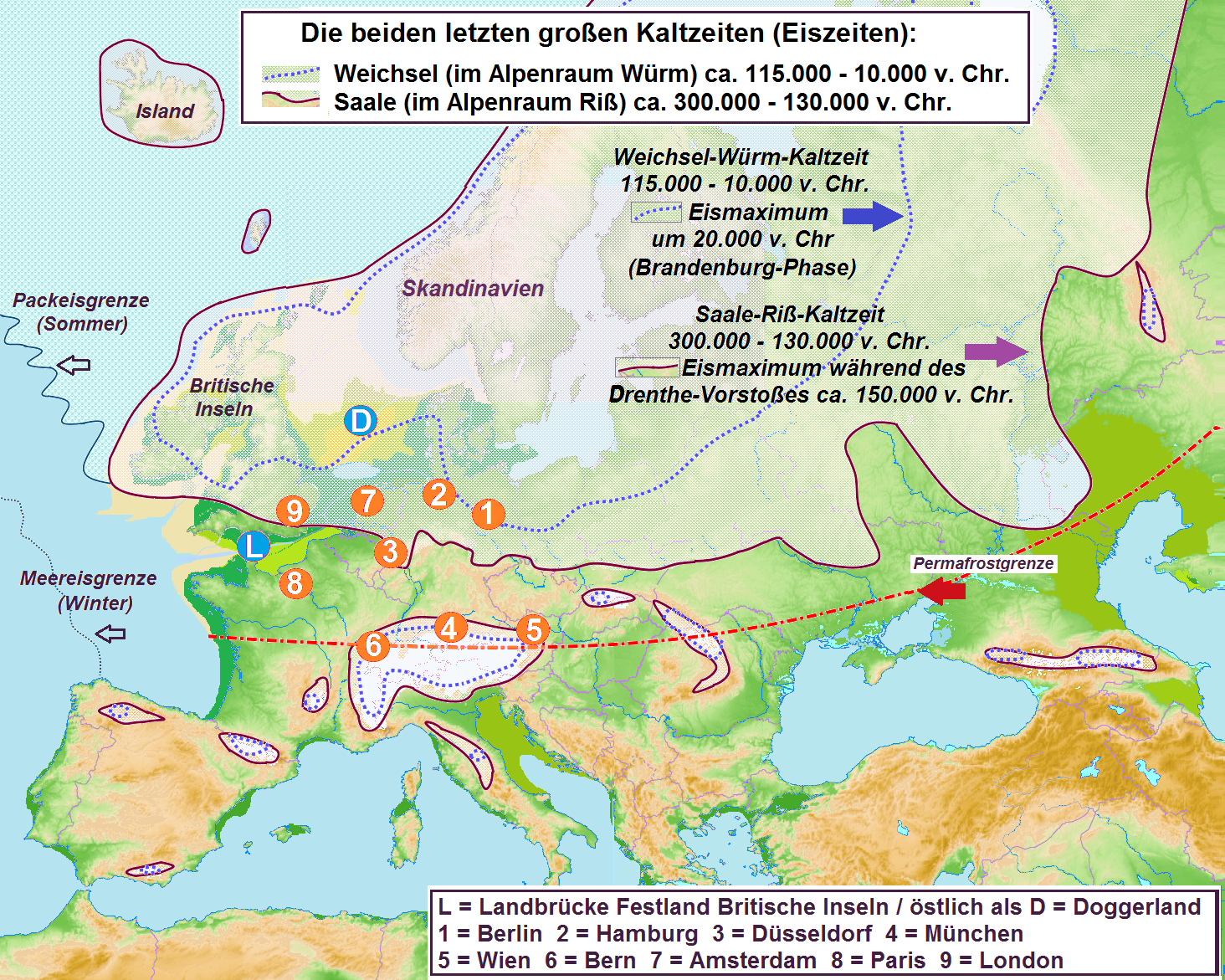 Saale- und Weichsel-Kaltzeit im Vergleich mit Eintragung der maximalen Vereisung